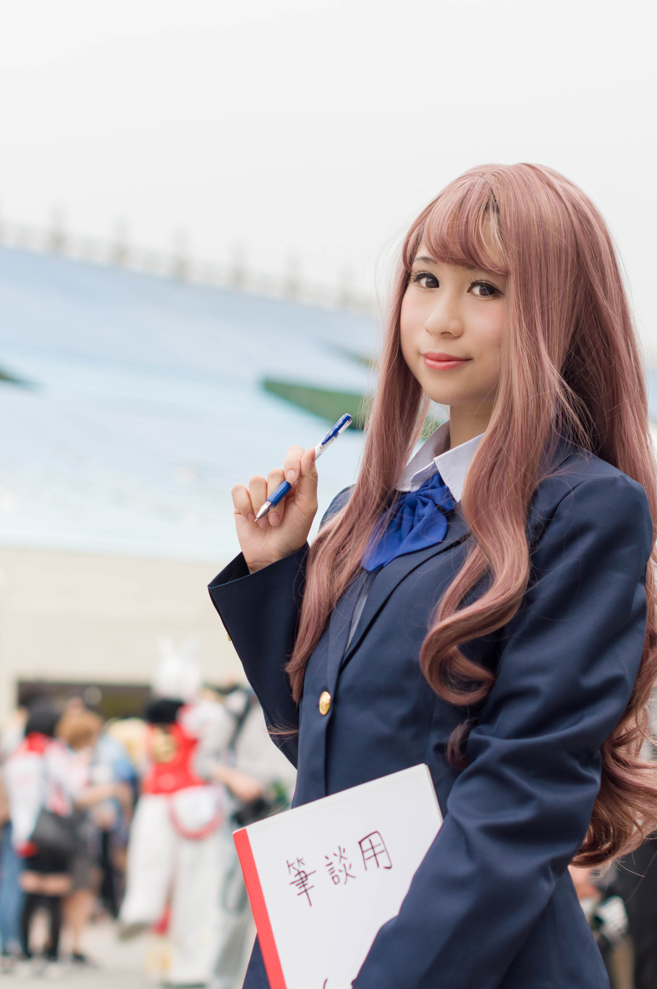 第26屆亞洲動漫創作展，《電影版 聲之形》西宮硝子cosplayer。